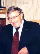 𐌲𐌿𐍄𐌹𐍃𐌺: Jean-Paul Proust